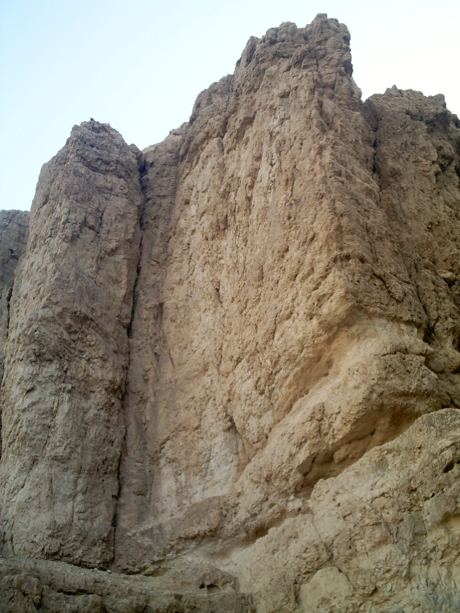 נוף ביציאת הערוץ של נחל תמר לכיוון ים המלח